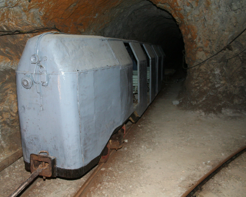 A felsőpetényi ásványbánya egyik személyszállító kocsija az V. táró V/1. elágazásánál 2006-ban.